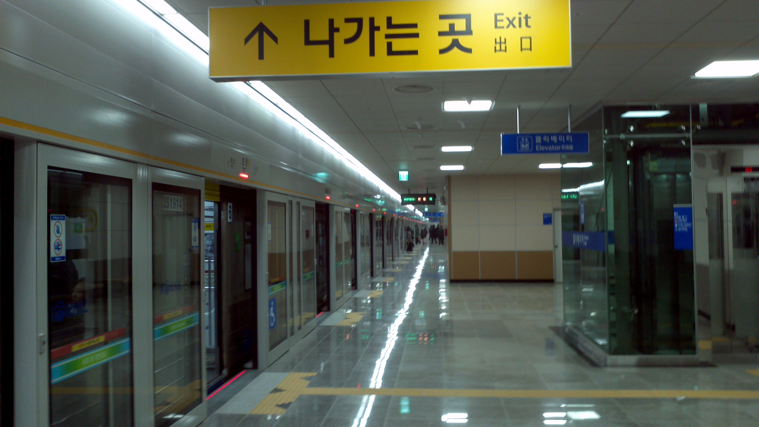 보정역 2번 승강장